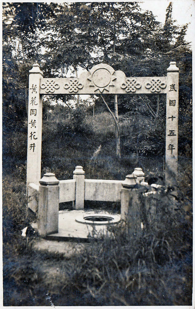 位於黃花崗七十二烈士墓園內的黃花井。